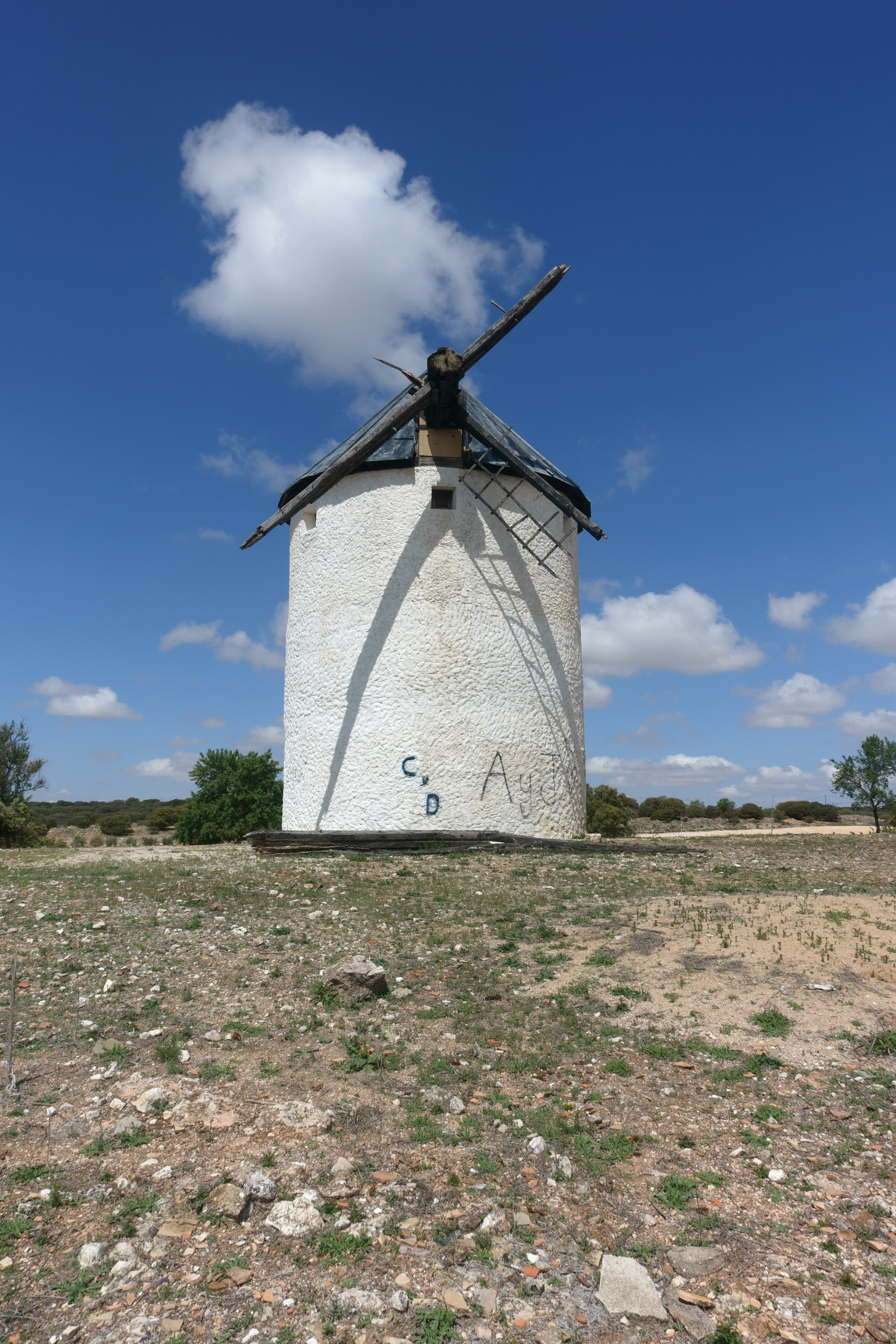 Molino en Los Hinojosos (Cuenca, España).